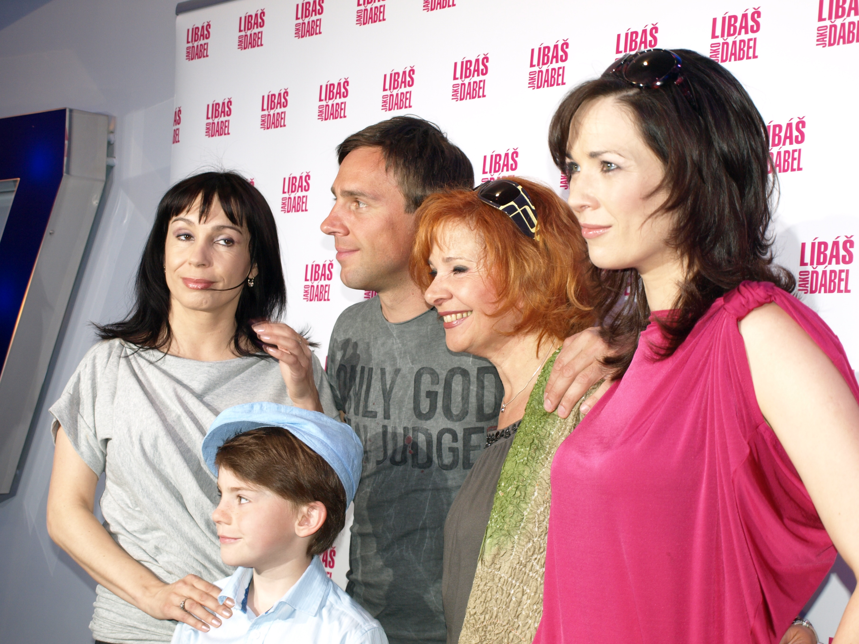 Líbáš jako ďábel - nov. projekce foto